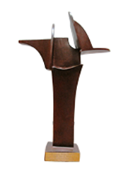 Premio Malaga Voluntaria